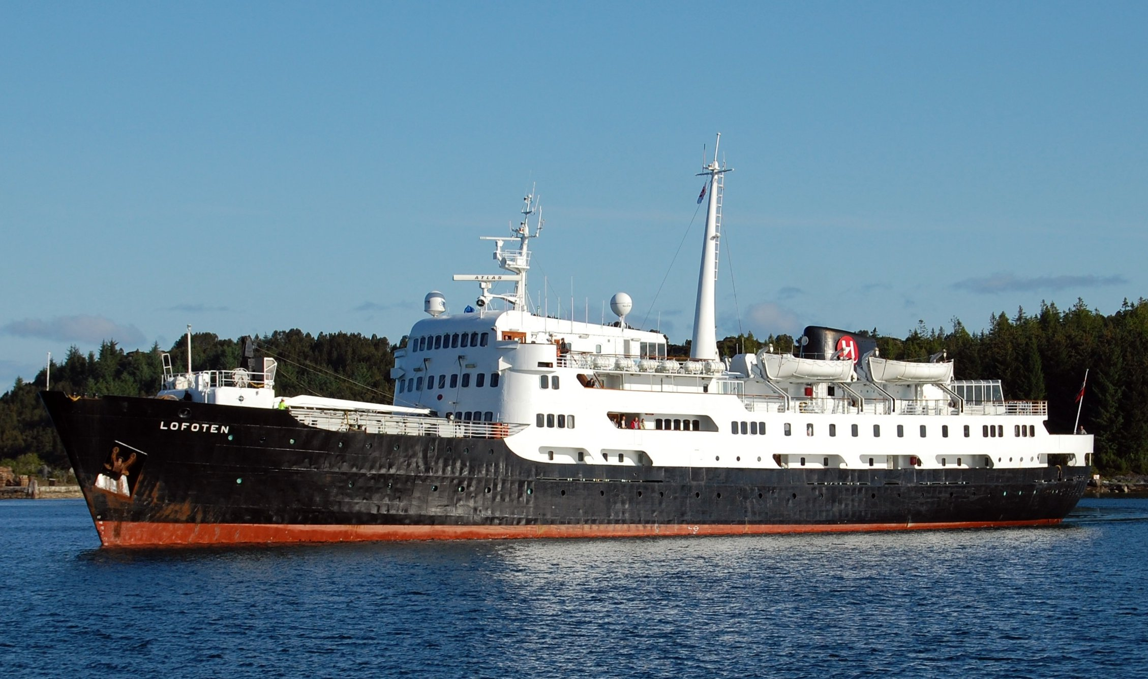 Hutrigruteskipet Lofoten i ferd med å leggje til kai i Florø